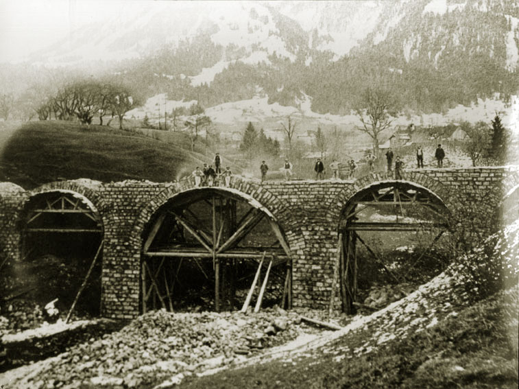 Bau der Bregenzerwaldbahn über den Pfisterbach Viadukt bei Andelsbuch (km 25,01), 1901 erbaut von Johann Bertolini (1859–1931) Alternative namesGiovanni Ferdinando BertoliniDescriptionAustrian architectDate of birth/death28 December 185931 December 1931Location of birth/deathRomallo (Trentino, Italy)Egg (Vorarlberg, Austria)Work period1879-1924Work locationSt. Gallen (Switzerland), Pustertalbahn, Arlbergtunnel, Schwarzenberg-Andelsbuch, Karlsruhe (Germany), Egg, Bezau, Andelsbuch, Flexenpassstraße, Damülser Straße, Schröcken, Alberschwende, Lingenau, Hittisau, Mellau, Hirschau, Bizau, Kleinwalsertal, Langen-Buch, Sibratsgfäll Rindberg, Sulzberg, Au-Lugen, Warth, Bregenzerwaldbahn.Authority control VIAF: 80430830 GND: 136014933 .